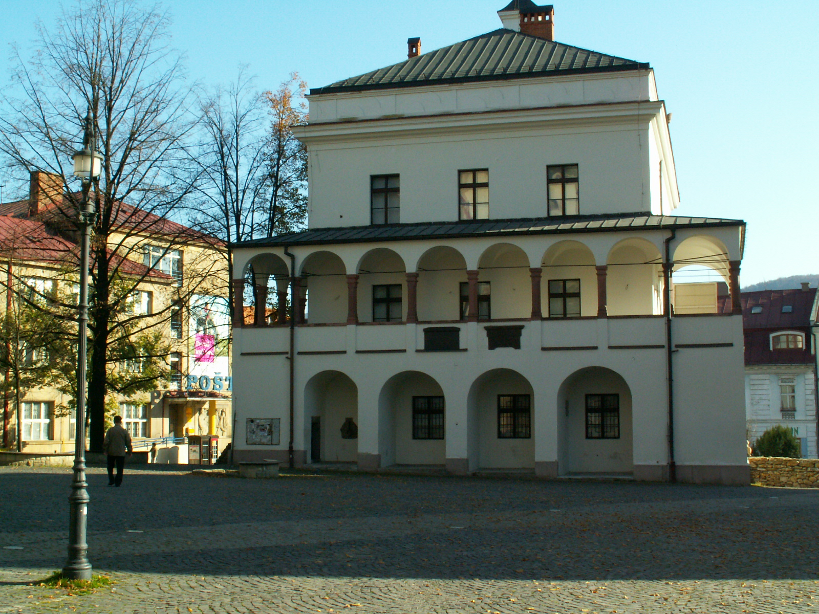 Areál hradu - radnica